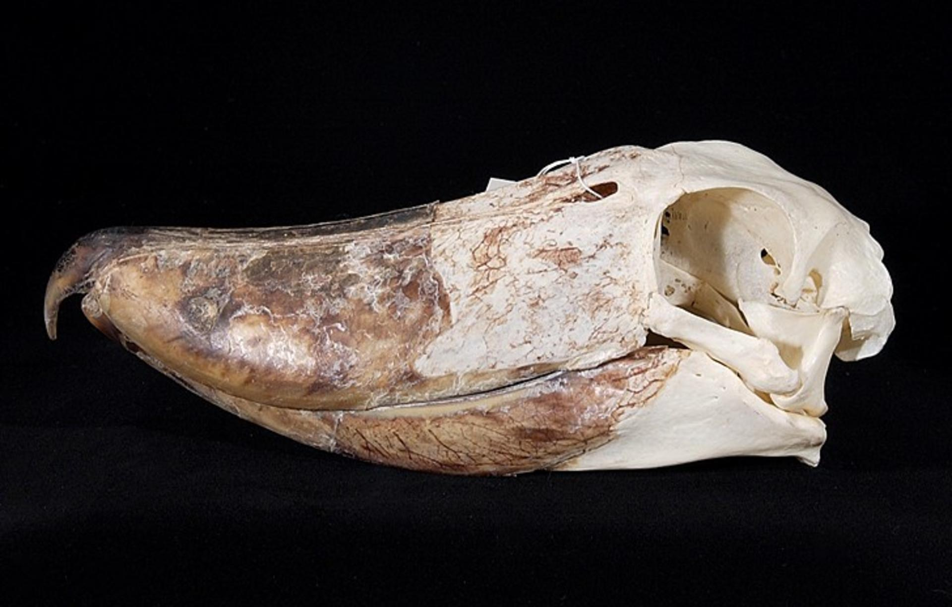 Balaeniceps rex Gould, 1850